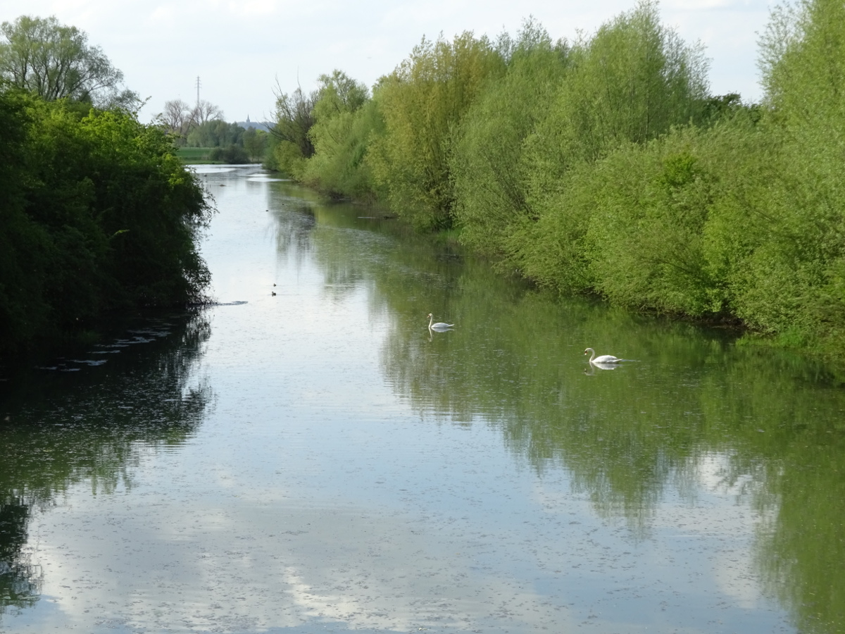 De Kalflak bij Emmericher Eyland